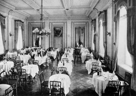 Restaurant Saratz, Jugendstilsaal